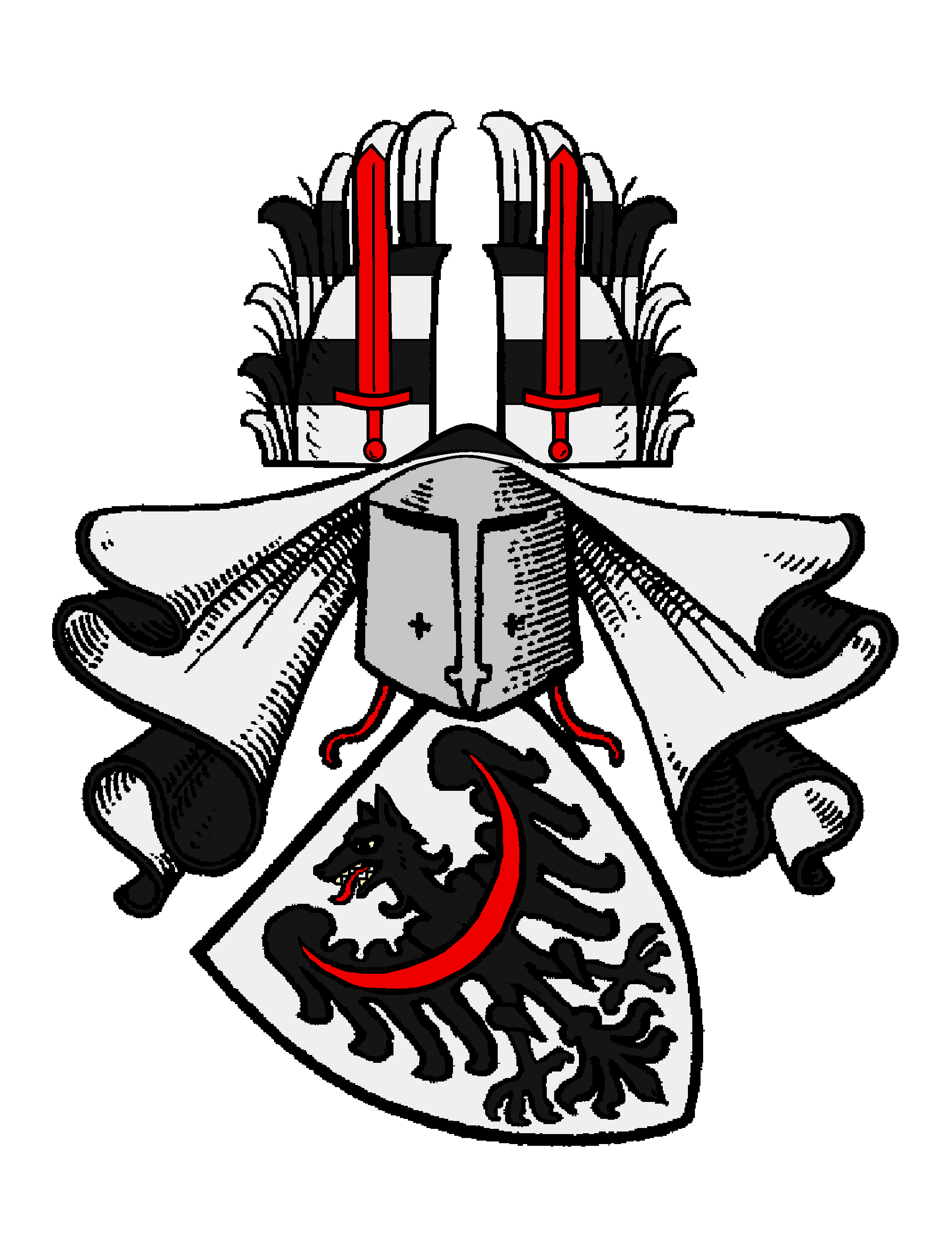 Stammwappen der von Flans(s) (Flanß o.ä.)